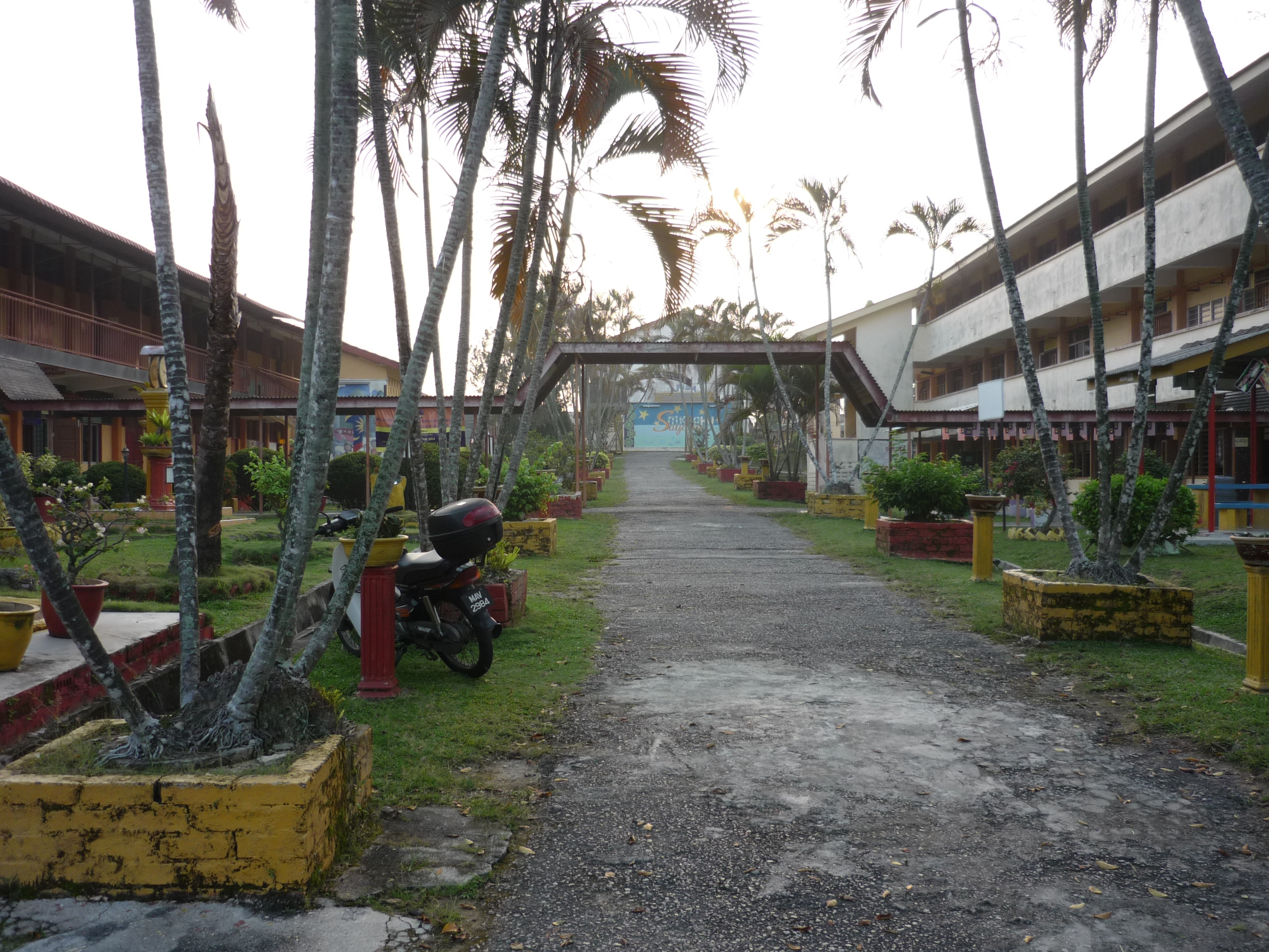 Panorama SMKDA